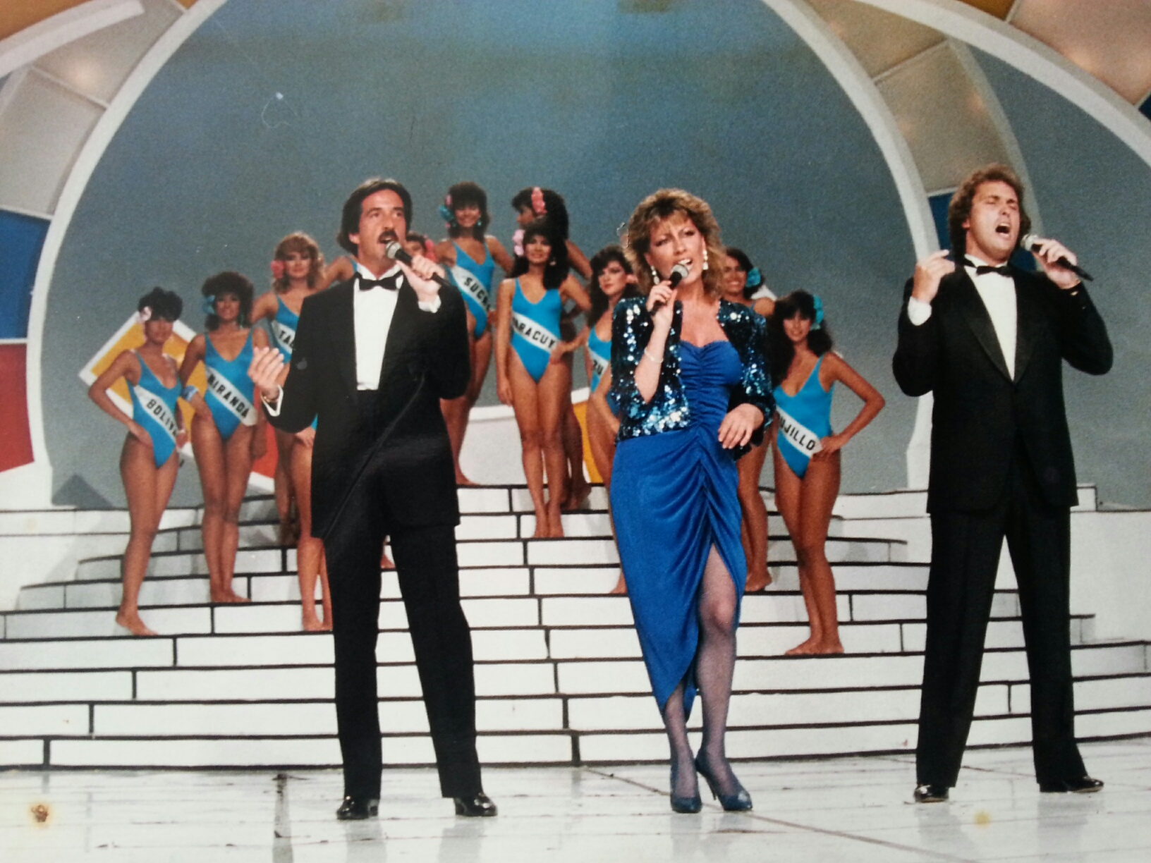 Presentación Miss Venezuela 1982